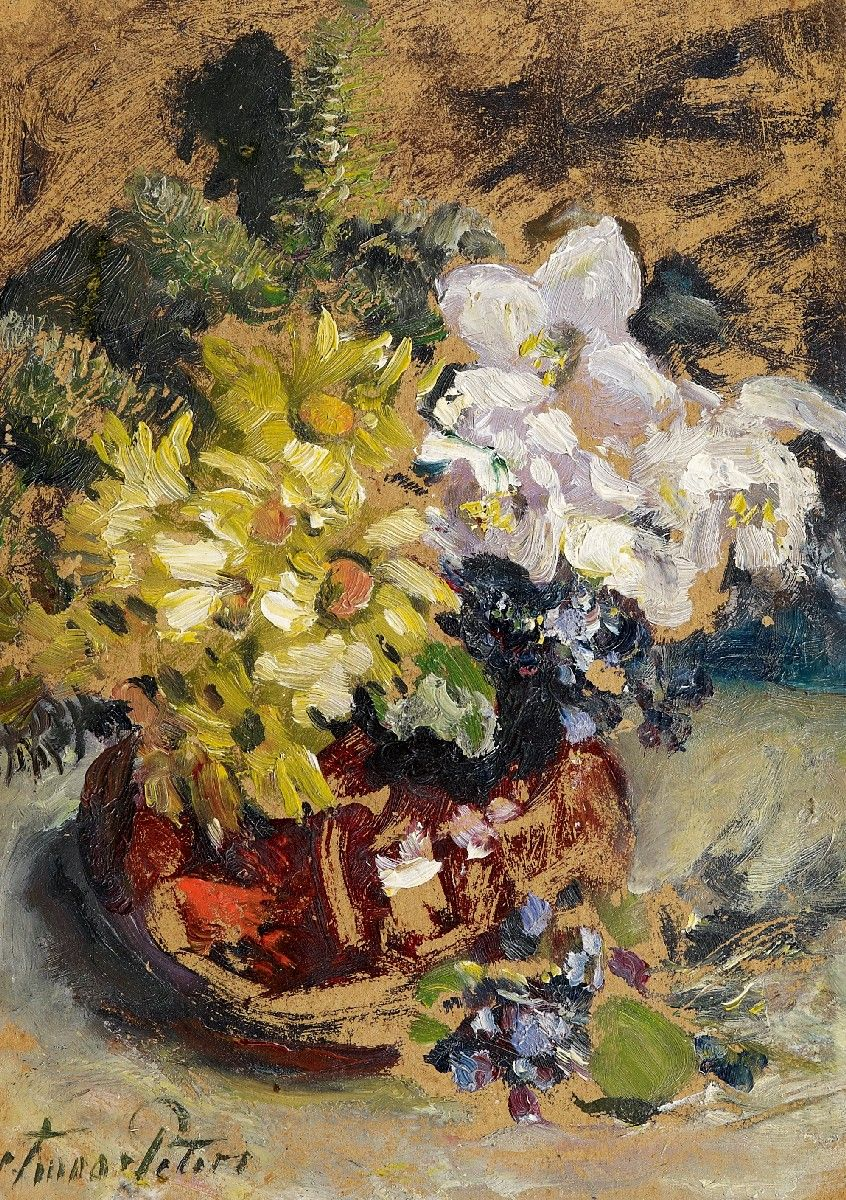 Blumenstillleben. Signiert unten links: Anna Peters. Öl auf Pappe. 26 x 18,5 cm.